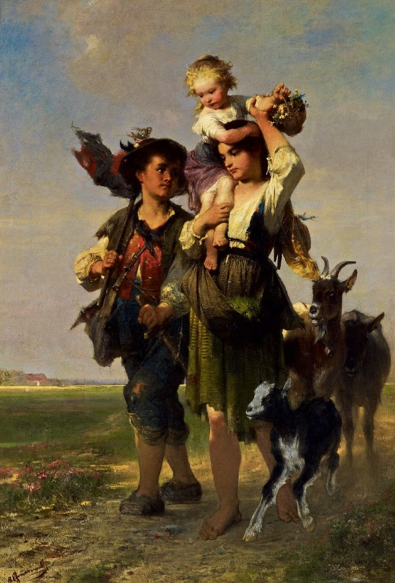 Kinder mit Geißen. Signiert unten links: J. Grünenwald. Öl auf Leinwand. 117 x 80 cm.